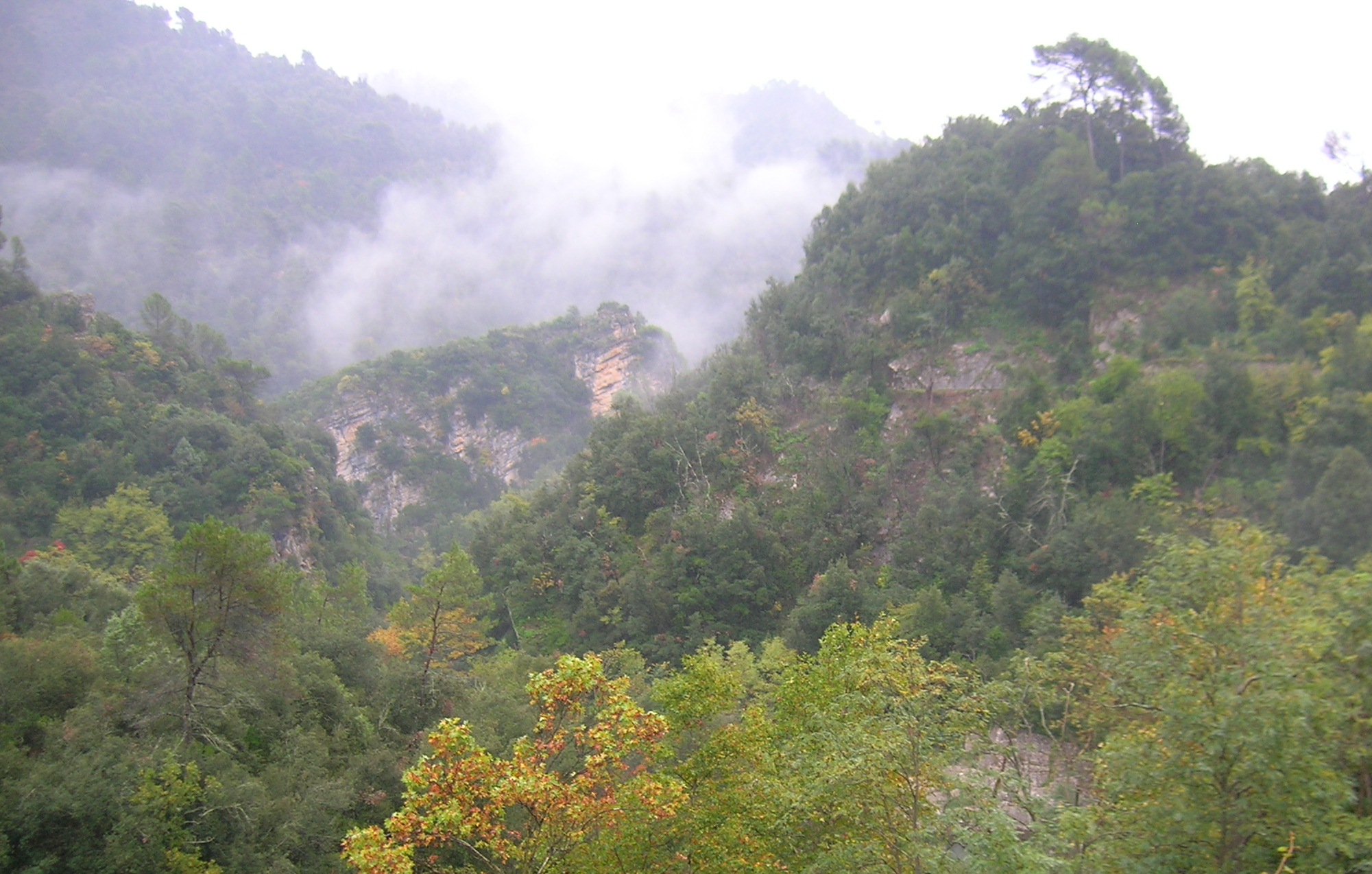 Olivetta San Michele, Liguria, Italia.